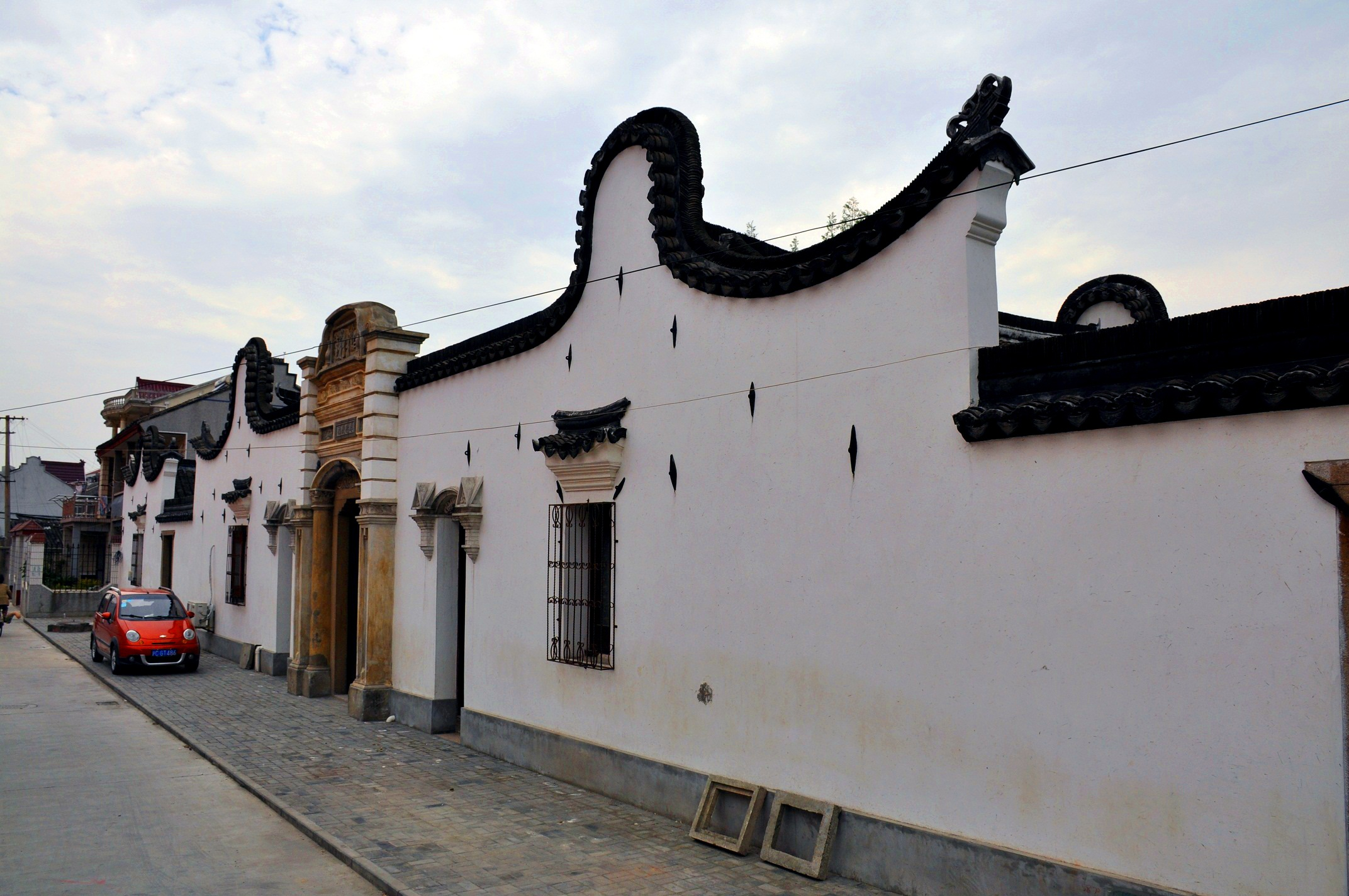 中文（中国大陆）: 大团镇永春北路88弄28-30号